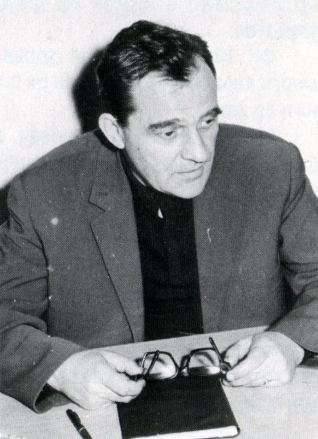 Српски (ћирилица): Живојин Спасојевић